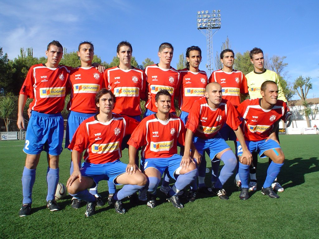 Once inicial del Gimnástico de Alcázar en un partido de liga contra el Tomelloso, jornada 6 de la temporada 2007/2008 en el grupo 18 de Tercera División de España. Los hombres de partida fueron: Alfonso, Requena, Monreal, Isaac, Edu Olivares, Xavi Andorrà, Beamud, David Martínez, Luismi, Huertas y Sergi Moreno.